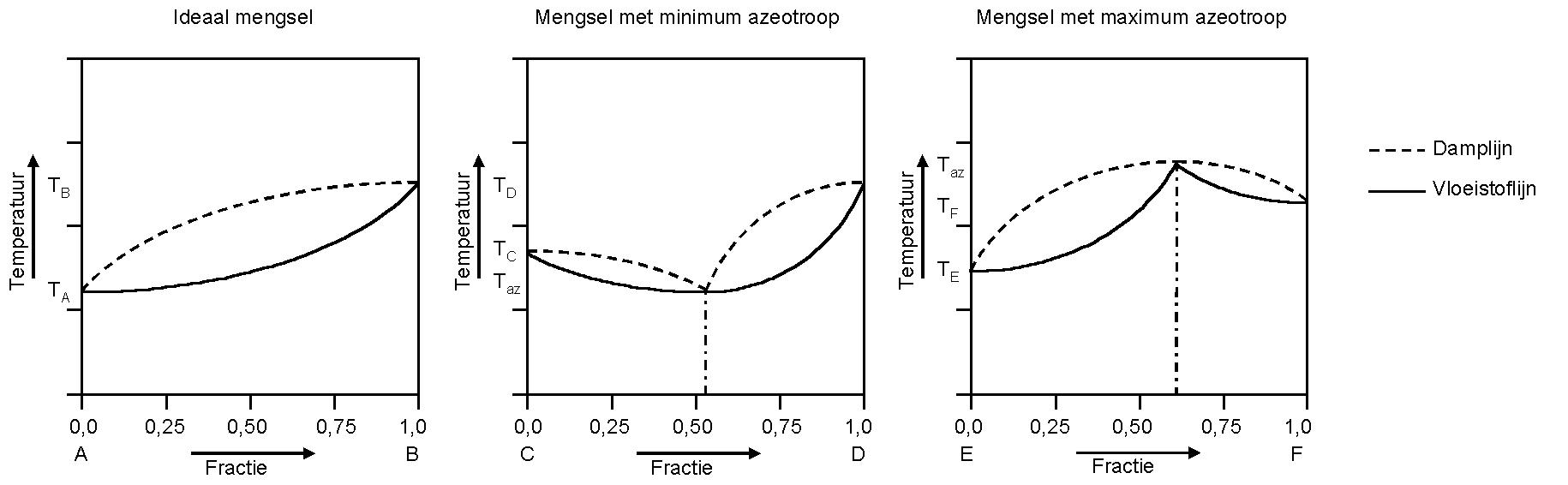 T,x-diagrammen azeotroop - eigen werk - publiek domein